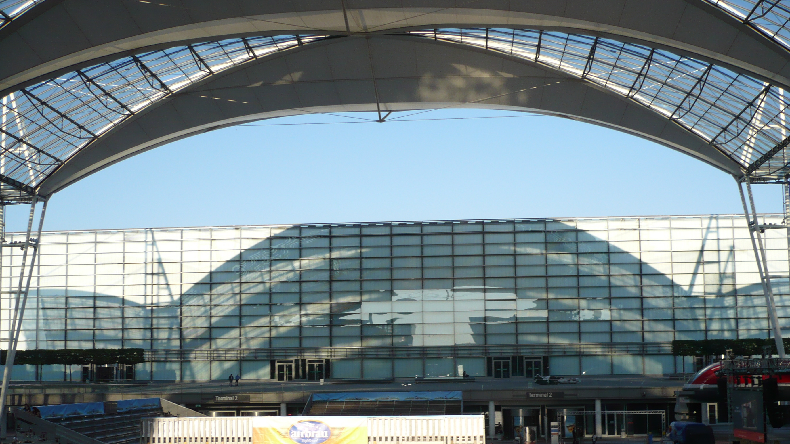 Blick vom München Airport Center auf die Haupthalle des Terminal 2 am Flughafen München